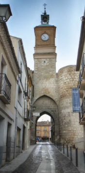 Puerta de la Villa (Almazán)